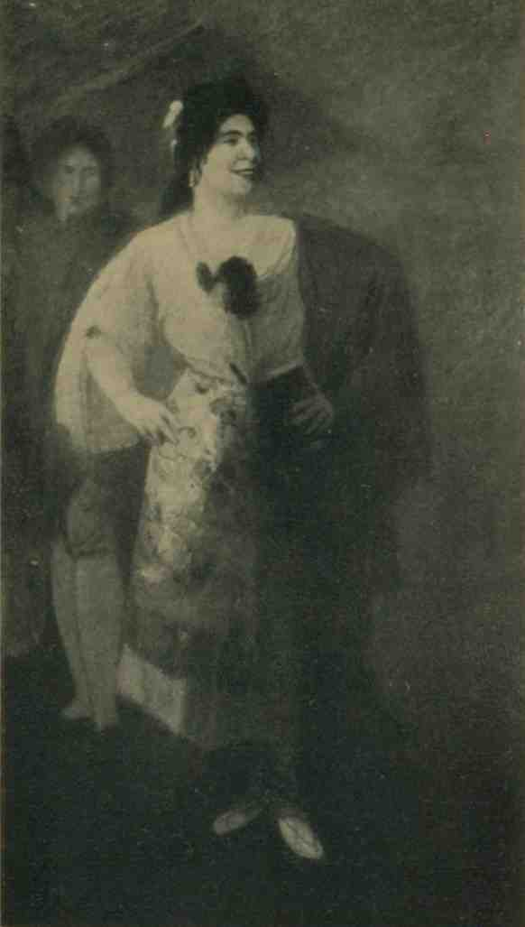 Anna Sutter als Carmen, Gemälde von Paul Bollmann (+1944), ehemals im Konversationszimmer des Großen Hauses des Königlichen Hoftheaters in Stuttgart.